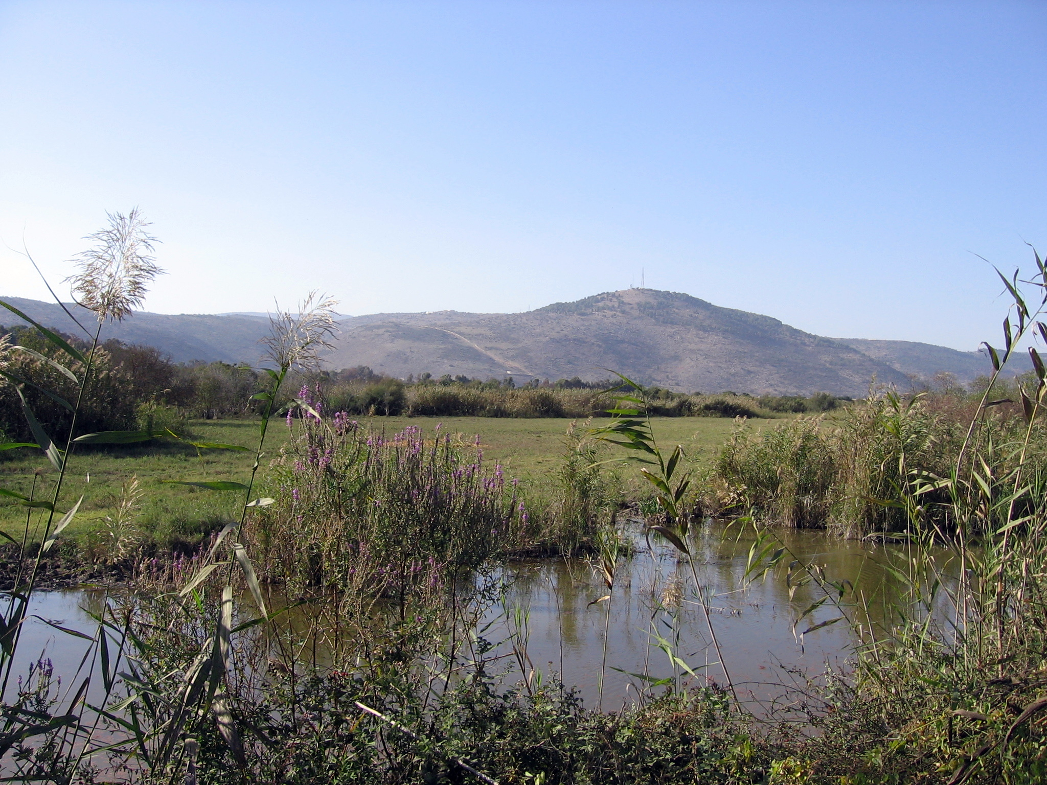 zafon 045 שמורת החולה